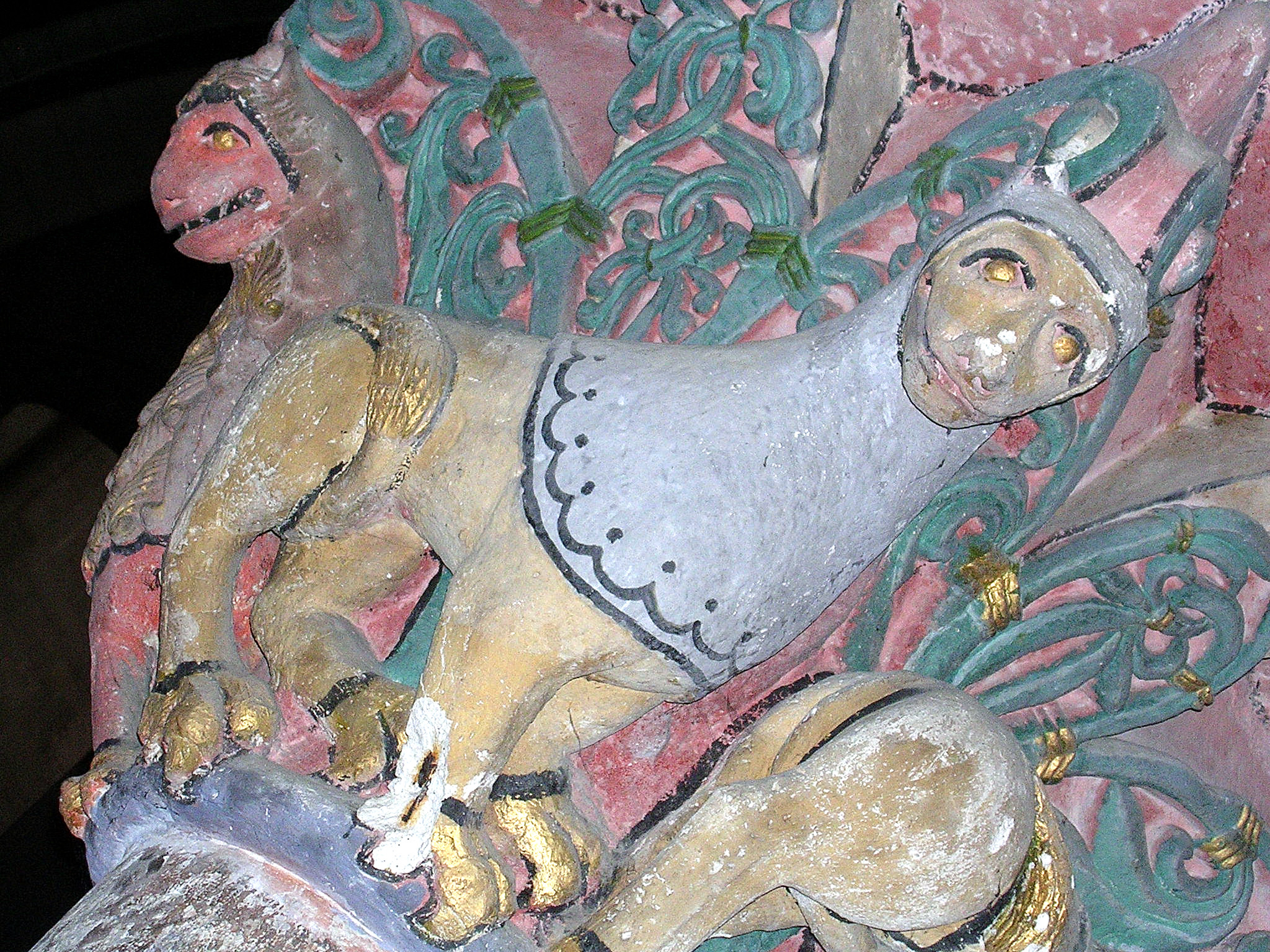 Abbaye bénédictine de Saint-Sever, dans les Landes (France) : chapiteau polychrome Photo prise par Jibi44 en juillet 2006